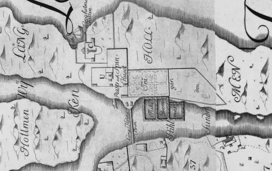 Del av Långholmen visande Spinnhusets trädgård